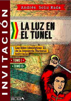 La Luz en el Túnel